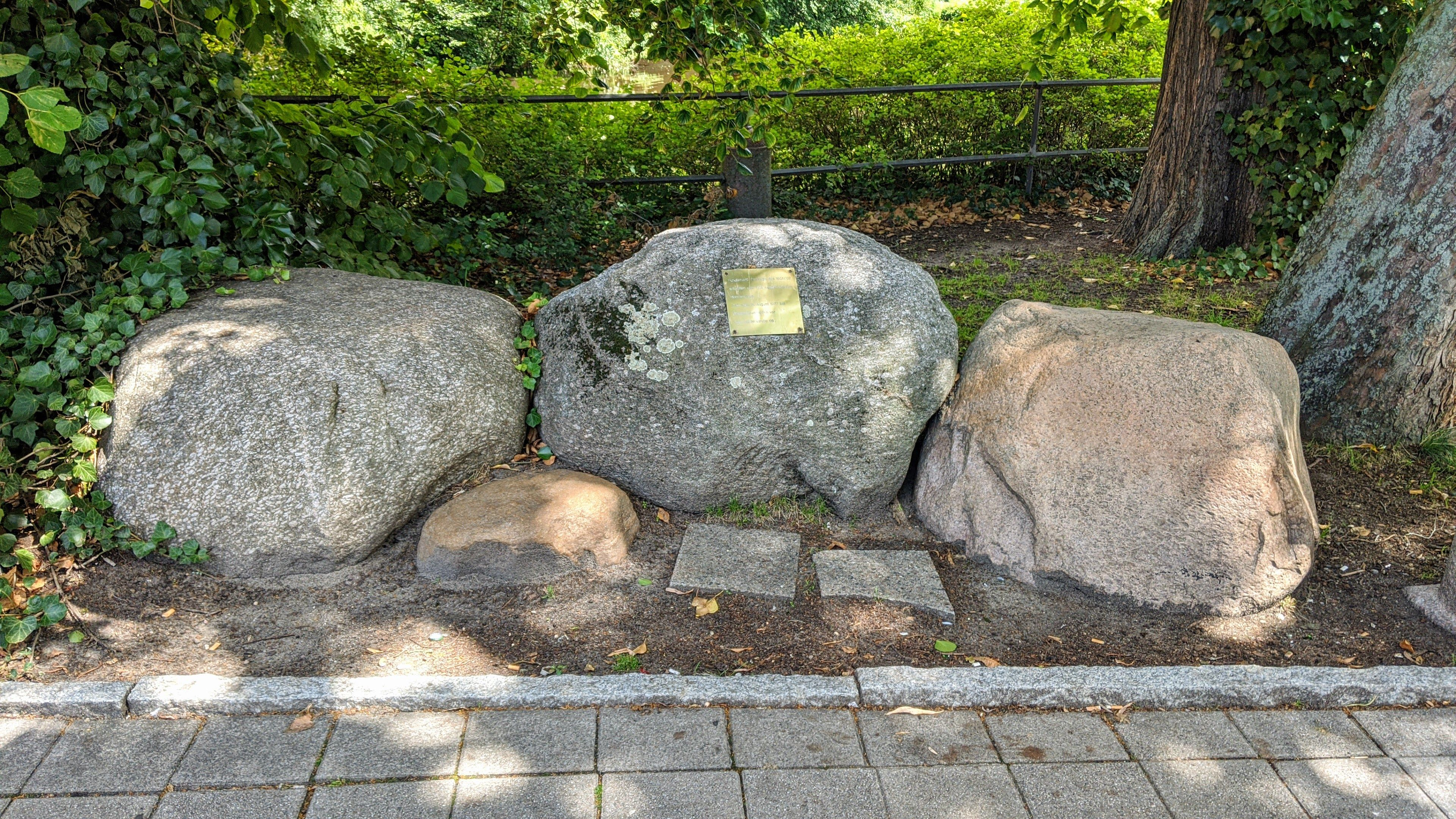 Fundamentsteine des ehemaligen Holstentores in Hamburg-Bergedorf